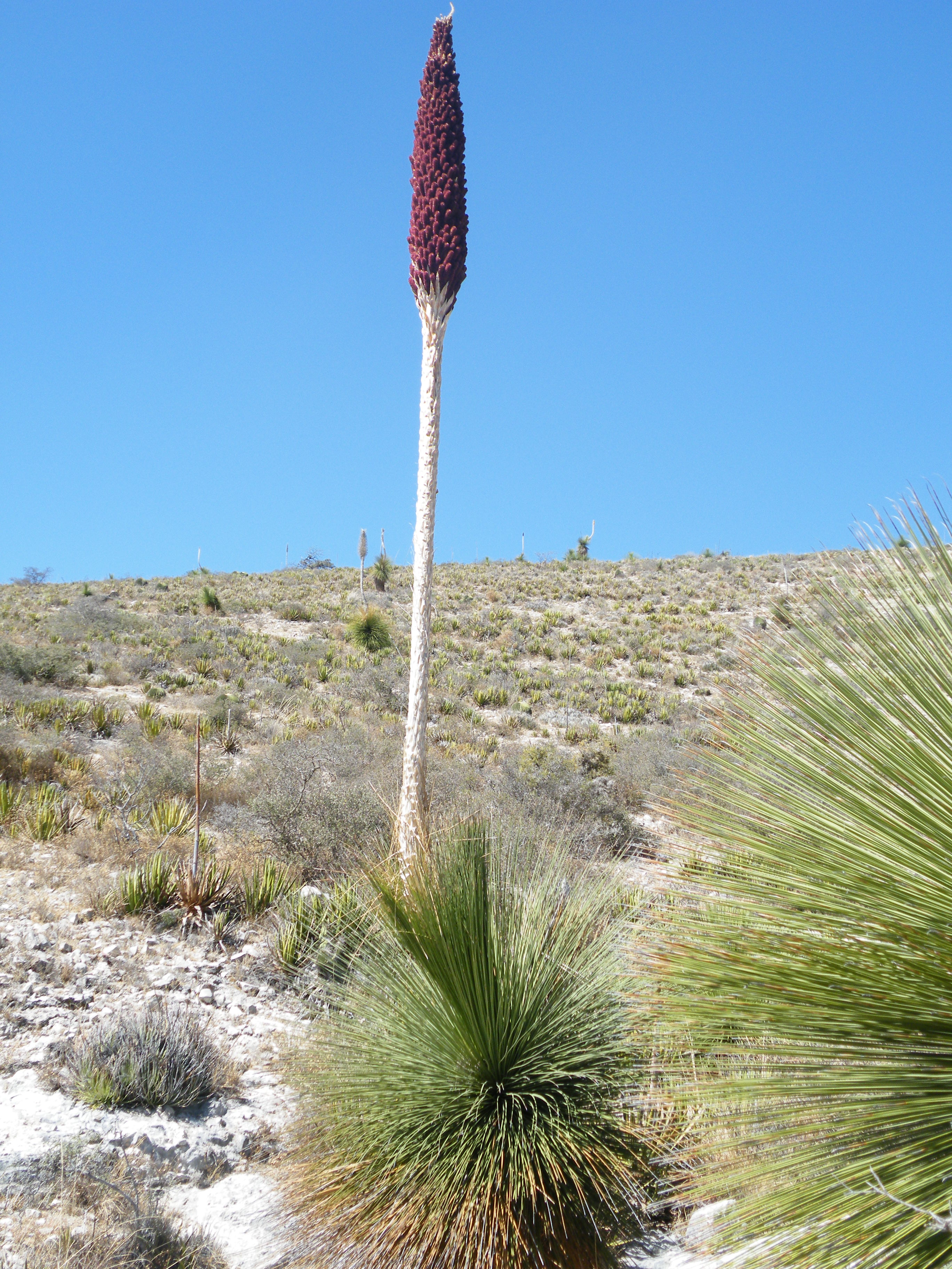 Dasylirion longissimum; Doctor Arroyo, Nuevo Leon